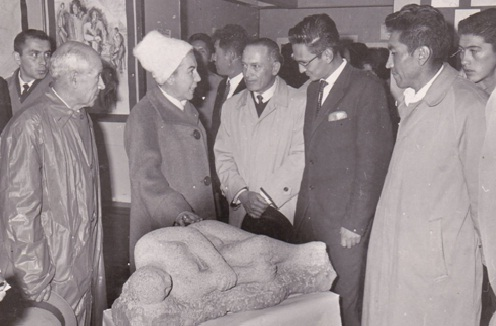 Exhibición de la obra "Sueño Andino" del artista Omar Duranboger Academia Nacional de Bellas Artes “Hernando Siles Reyes” La Paz, Bolivia, 1963 En la Fotografía, el Autor y Maestros Plásticos Nacionales.De Izq. A Der. Genaro Ibañez (Grabador), Marina Nuñez del Prado (Escultora), Alejandro Gonzáles (Escultor), Omar Duranböger (Escultor), Víctor Zapana Serna (Escultor)